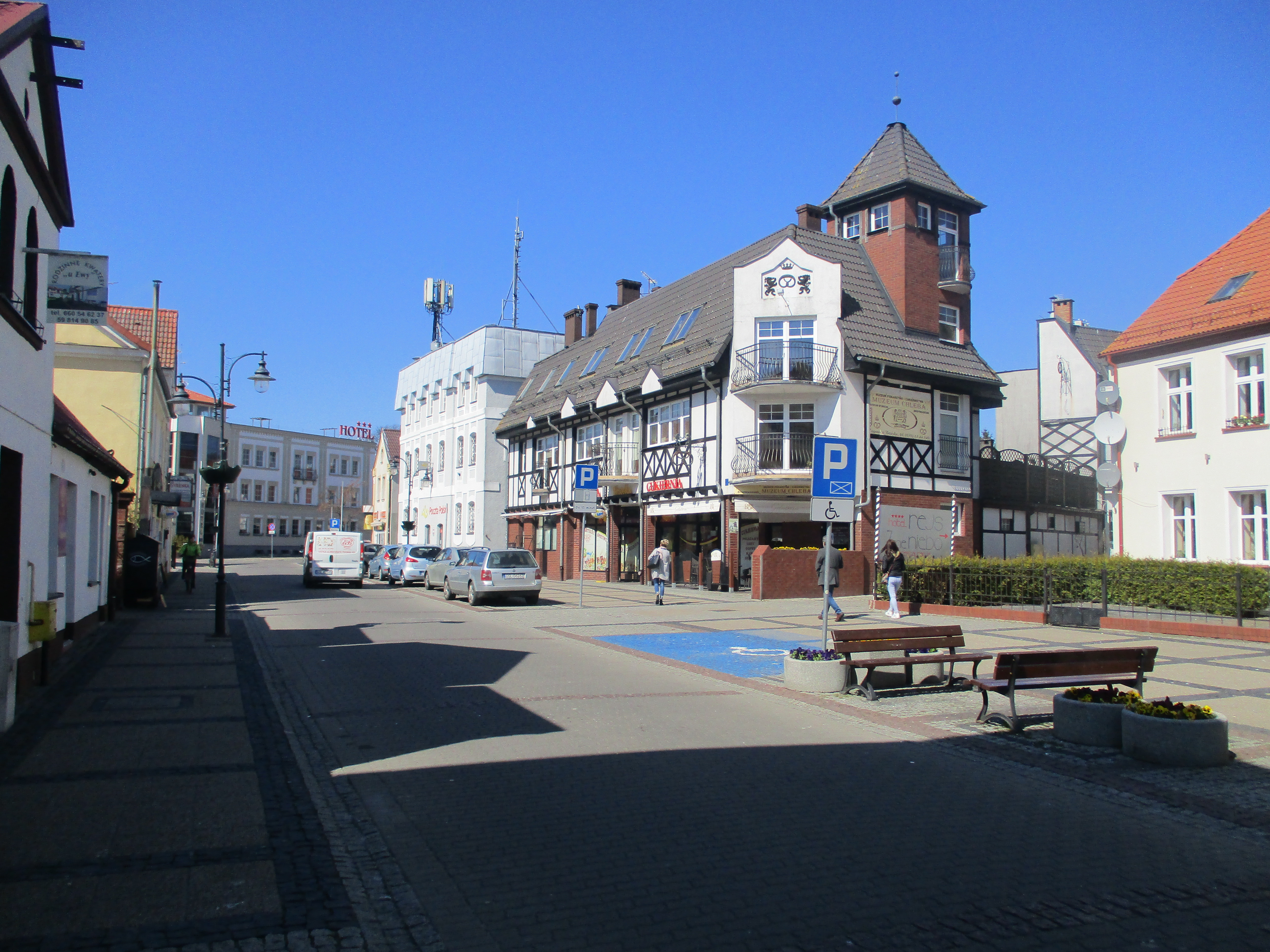 Ustka; ul. Marynarki Polskiej